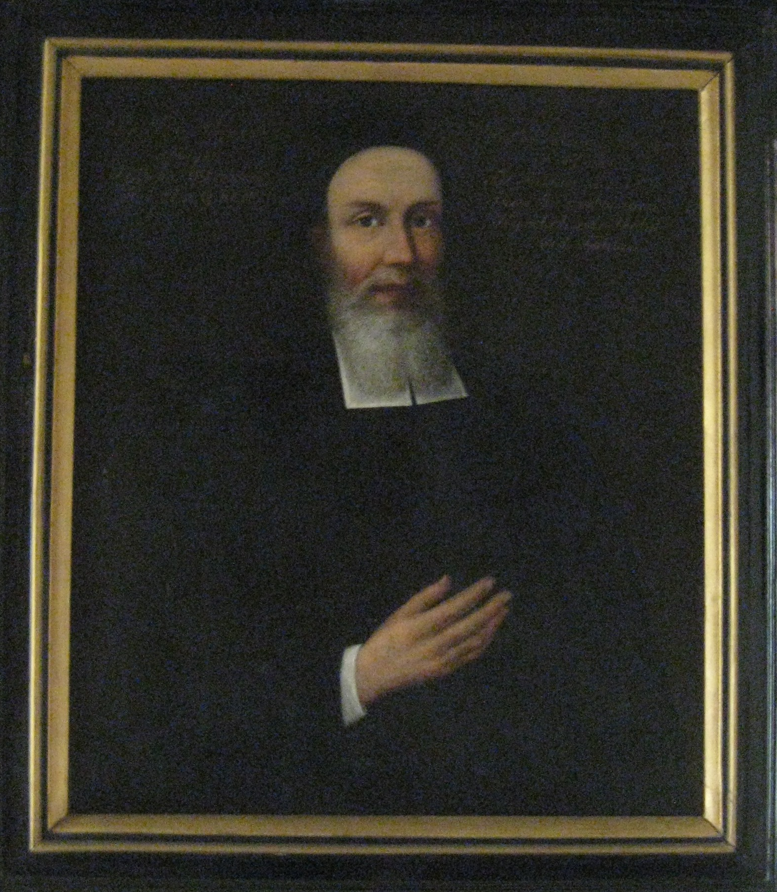 Eric Biörck kyrkoherde i Falun 1713-1740. Porträtt av okänd konstnär. Bilden hänger i det s.k. prästrummet i Falu Kristine kyrka.